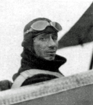 Richard Dietrich um 1927